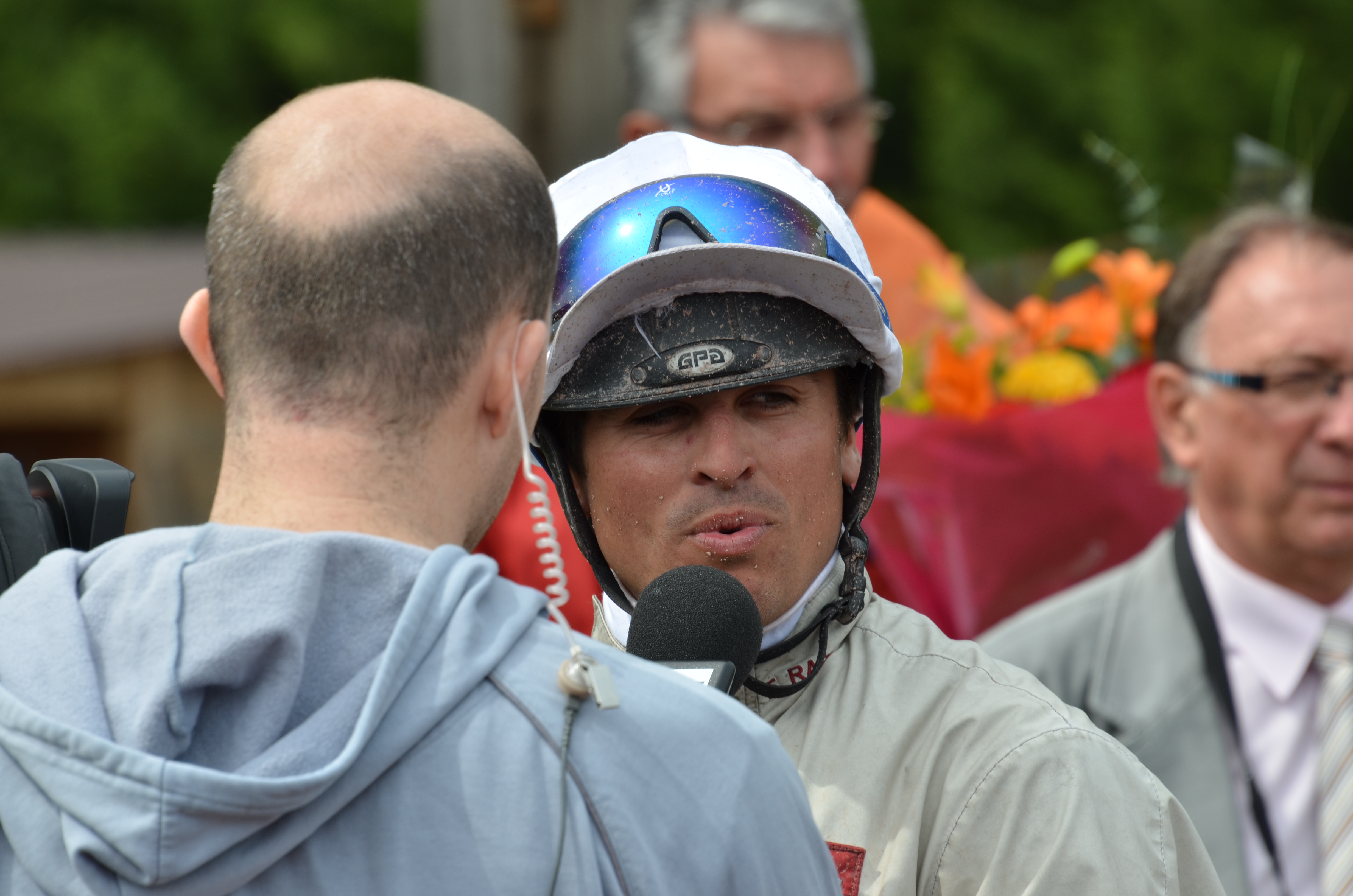 Eric Raffin à Chartres le 4 Mai 2012.